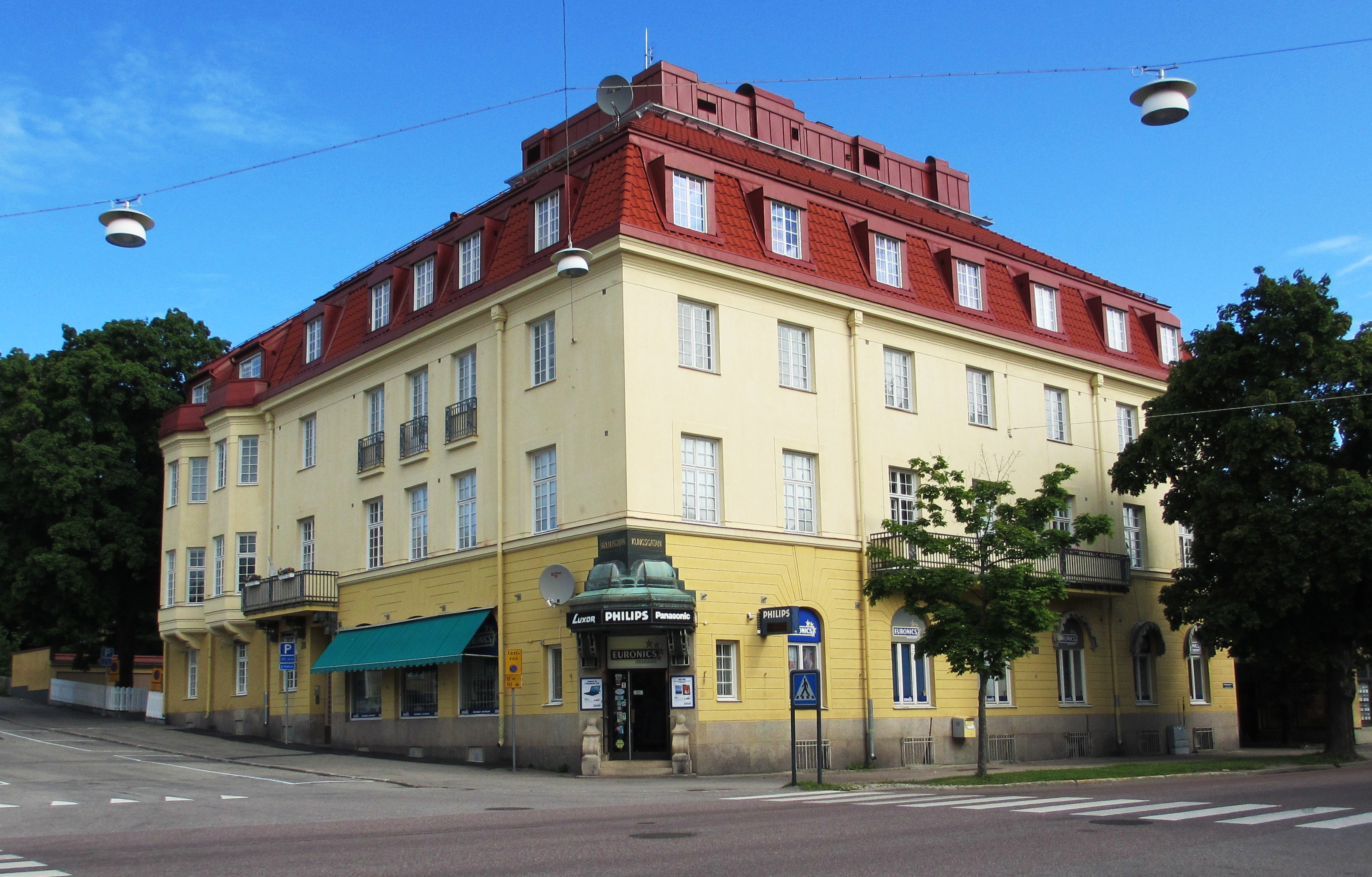 Gamla sparbankshuset i Söderhamn. Byggnadsår 1912-1914. Arkitekter: Hagström & Ekman